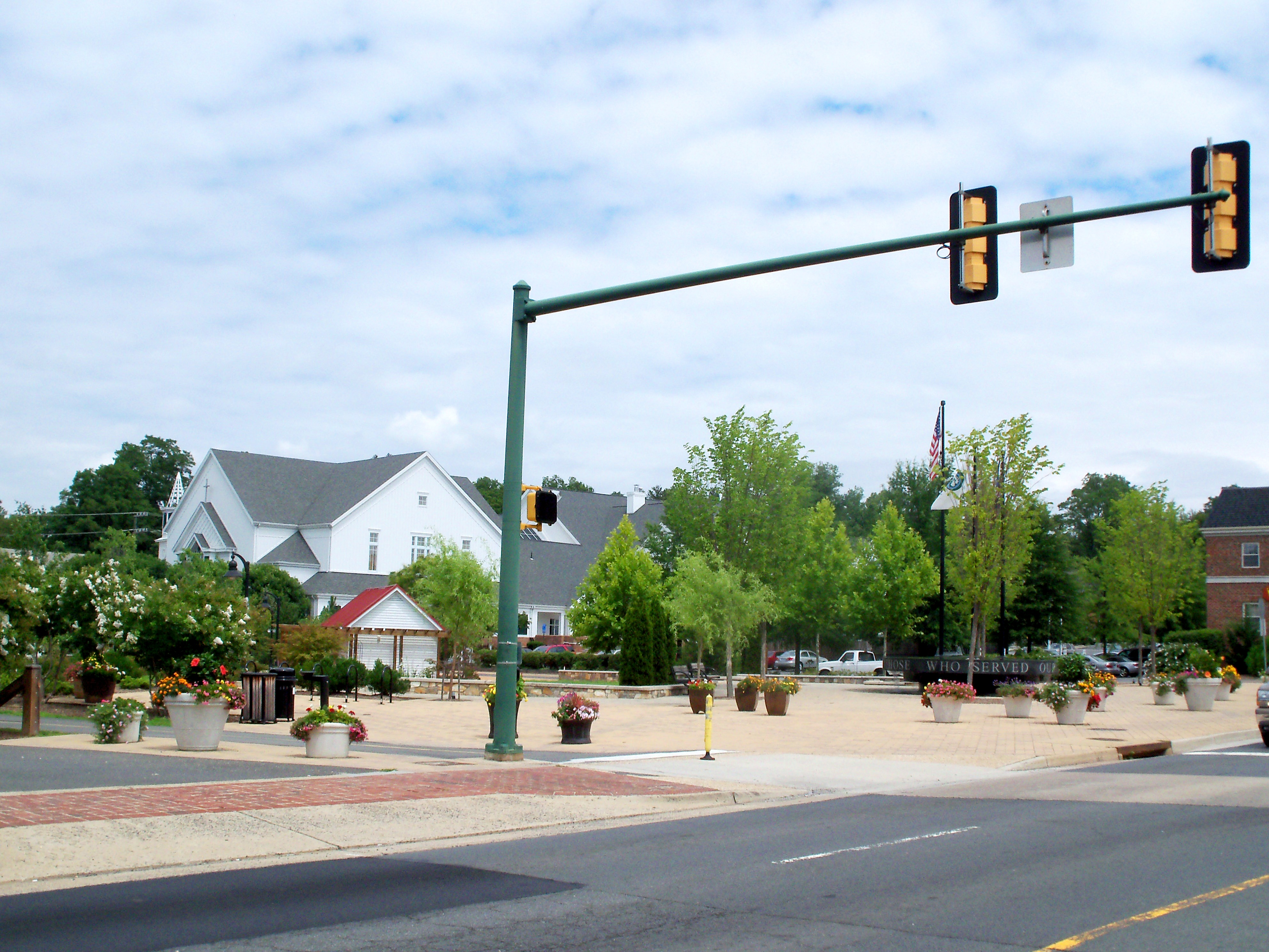 Vienna, VA 22180, USA